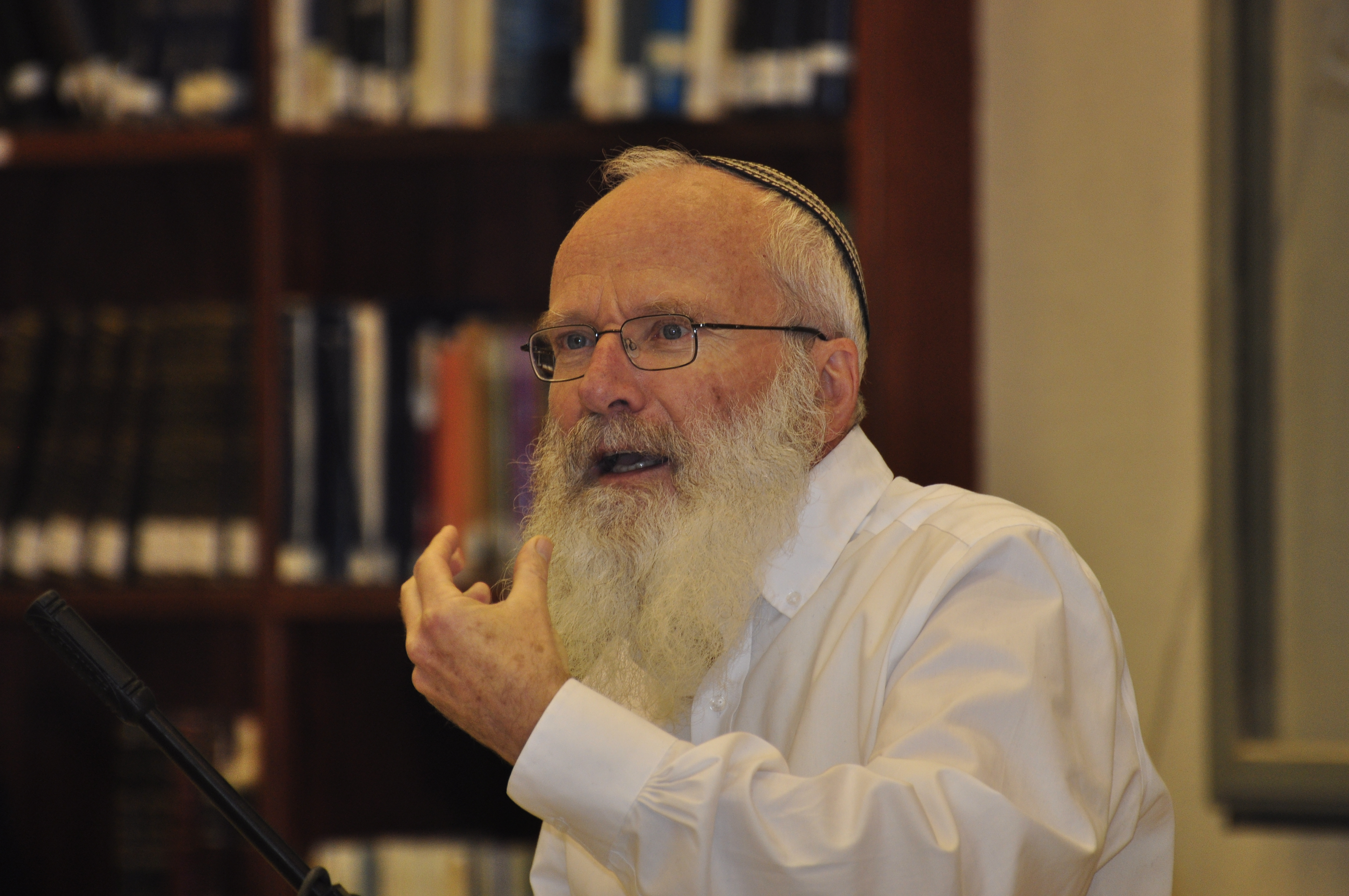 הרב אליהו בלומנצויג, ראש ישיבת ההסדר בירוחם